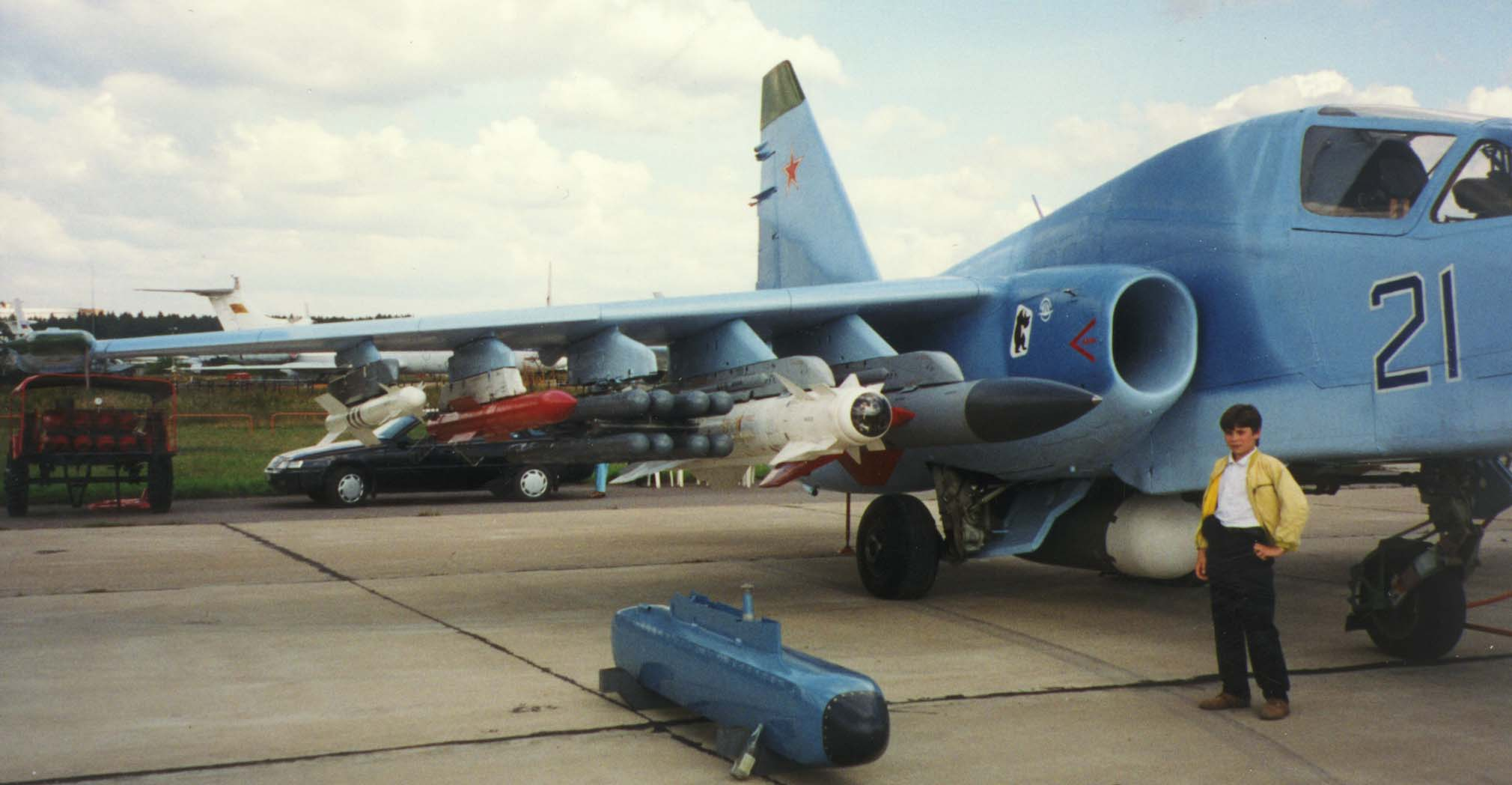 Su-25 TM